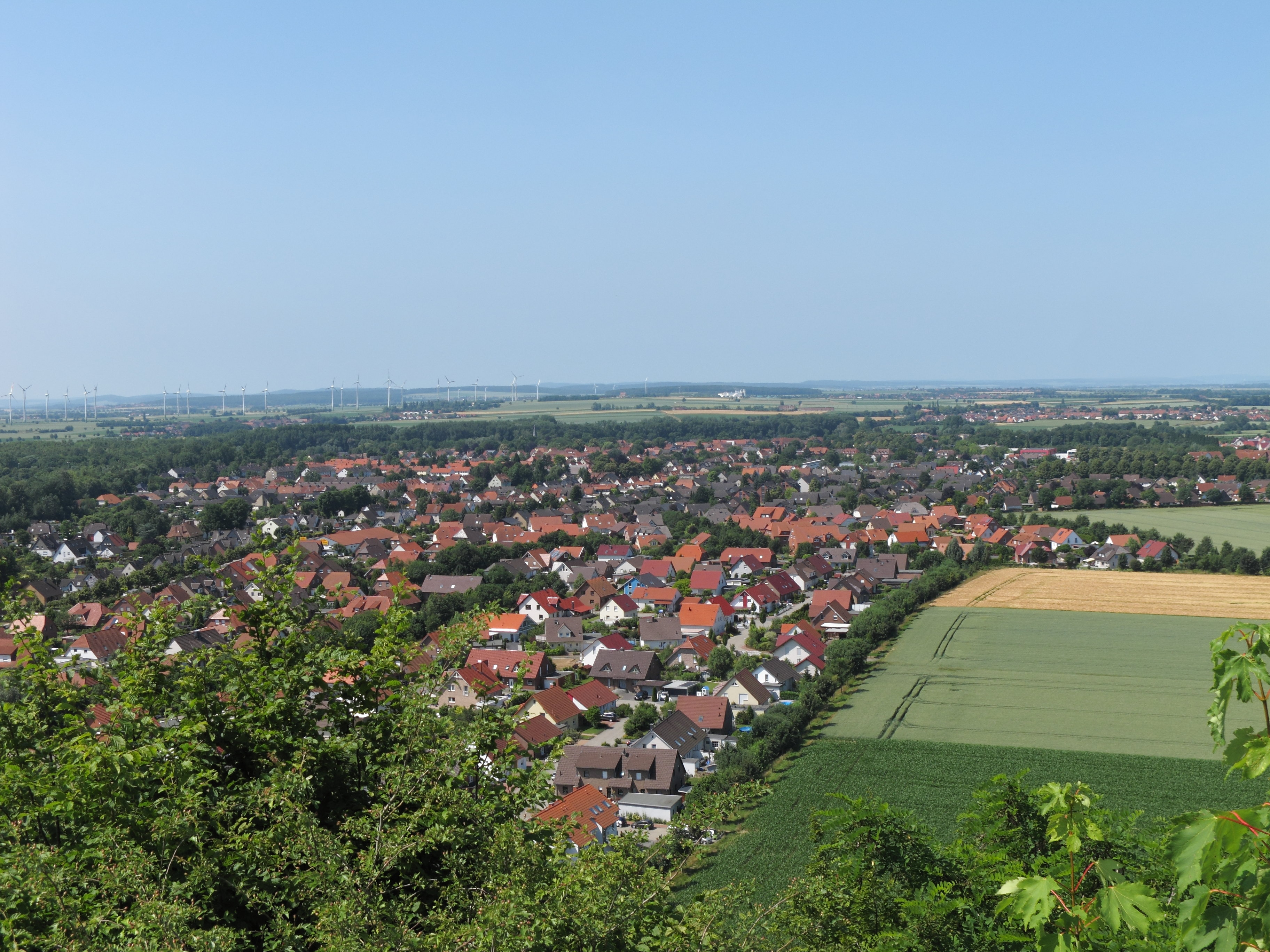 Aussicht vom Seilbahnberg auf Lengede